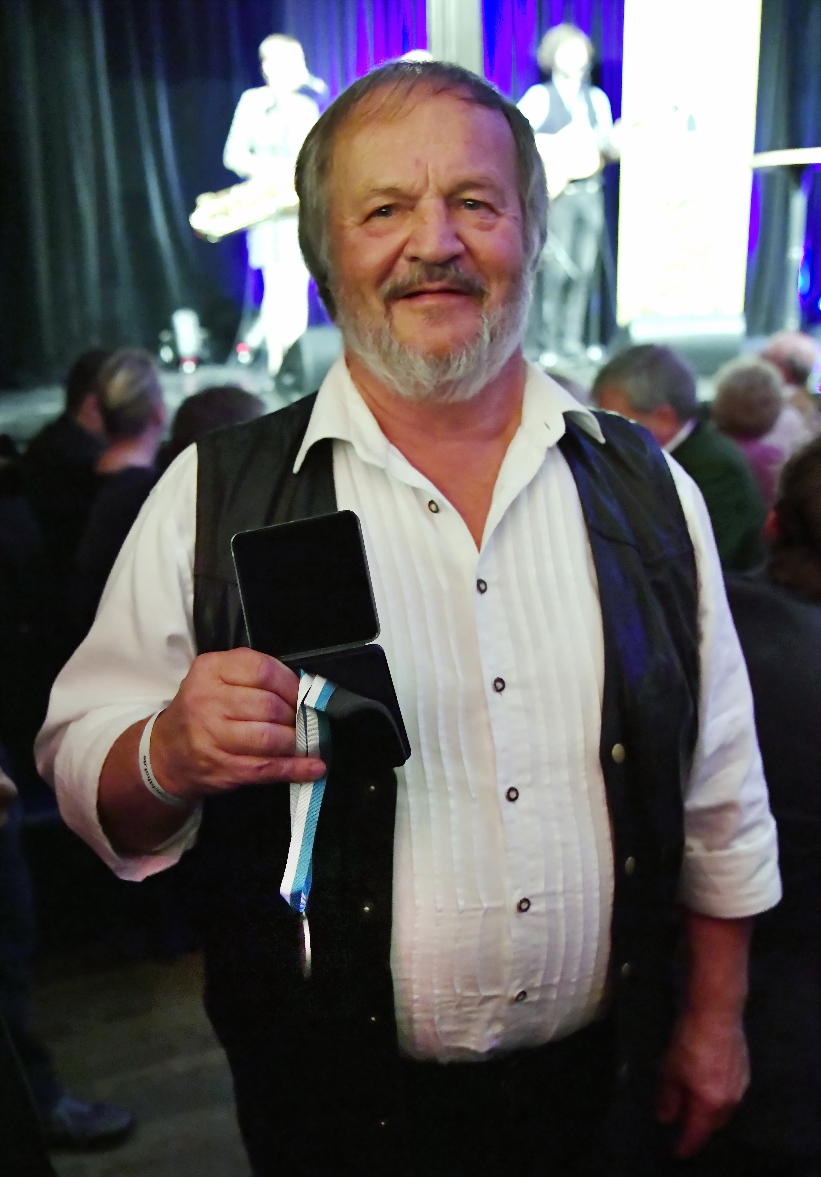 Fredl Fesl bei der Verleihung des Poetentalers 2017